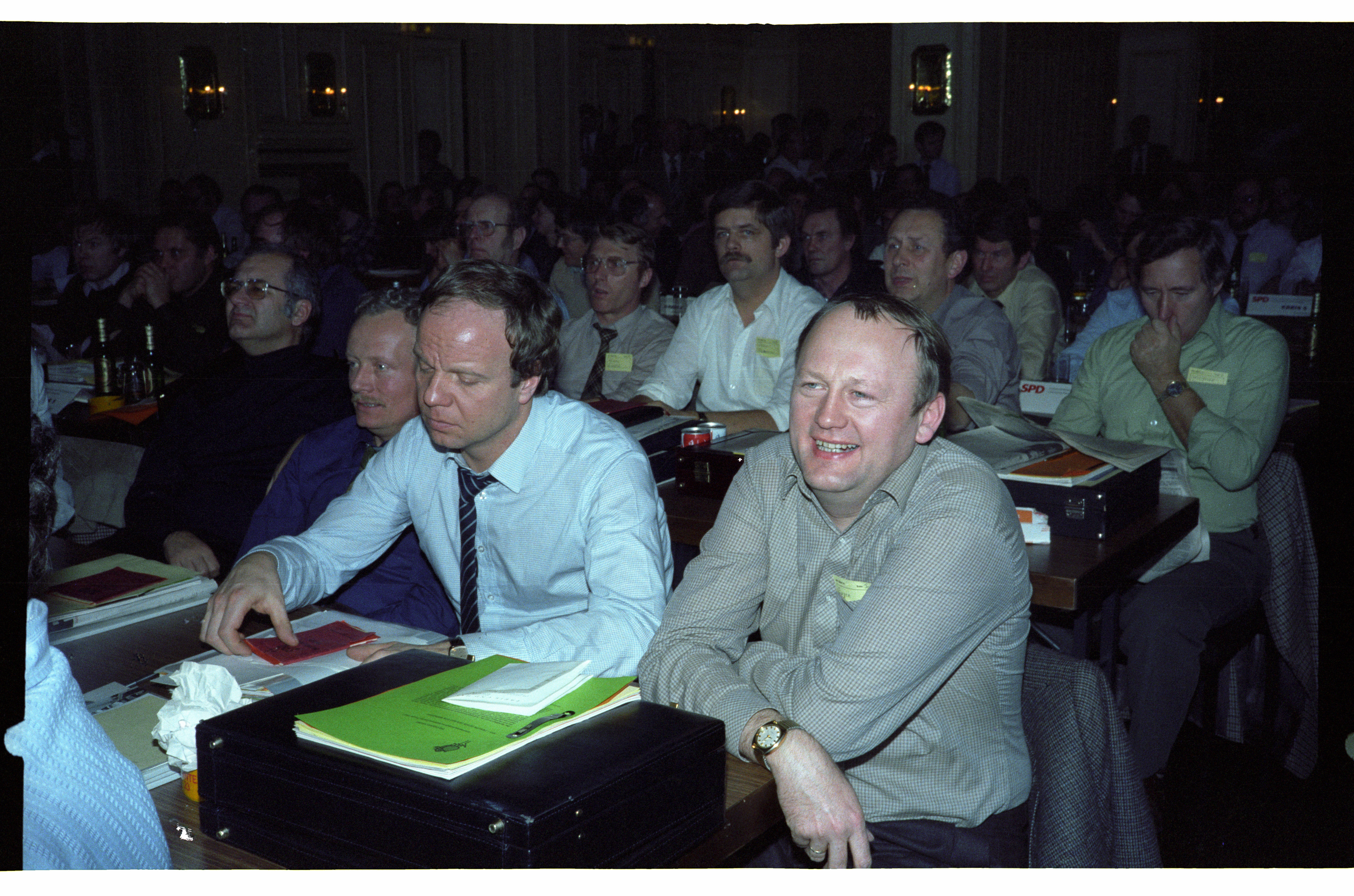 Landesparteitag der SPD 1981 in Hamburg. Von rechts 1. Reihe: Senator Eugen Wagner, Senator Volker Lange, Hubert Piske MdHB